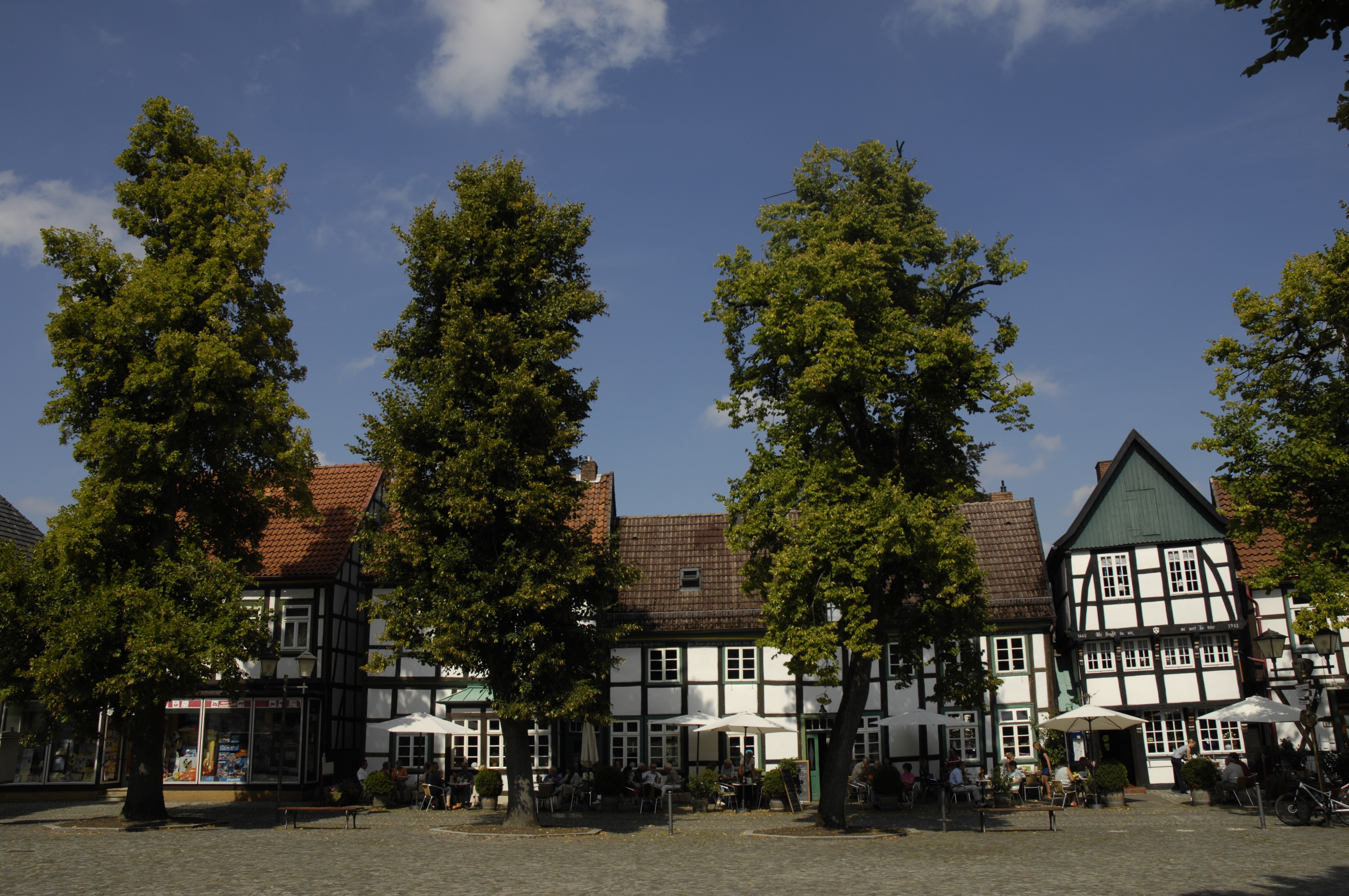 Ortsbildprägente Häuser am Kirchplatz in Bad Essen.